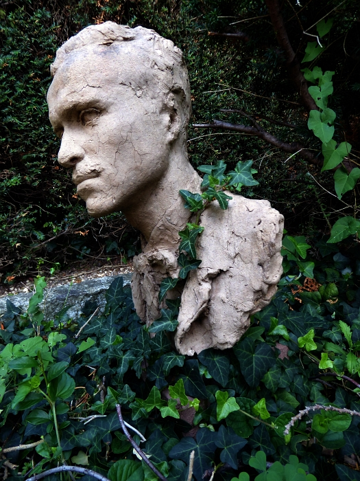 Büste Emil Beurmann 1862-1951 Maler und Schriftsteller, Friedhof Wolfgottesacker, Basel